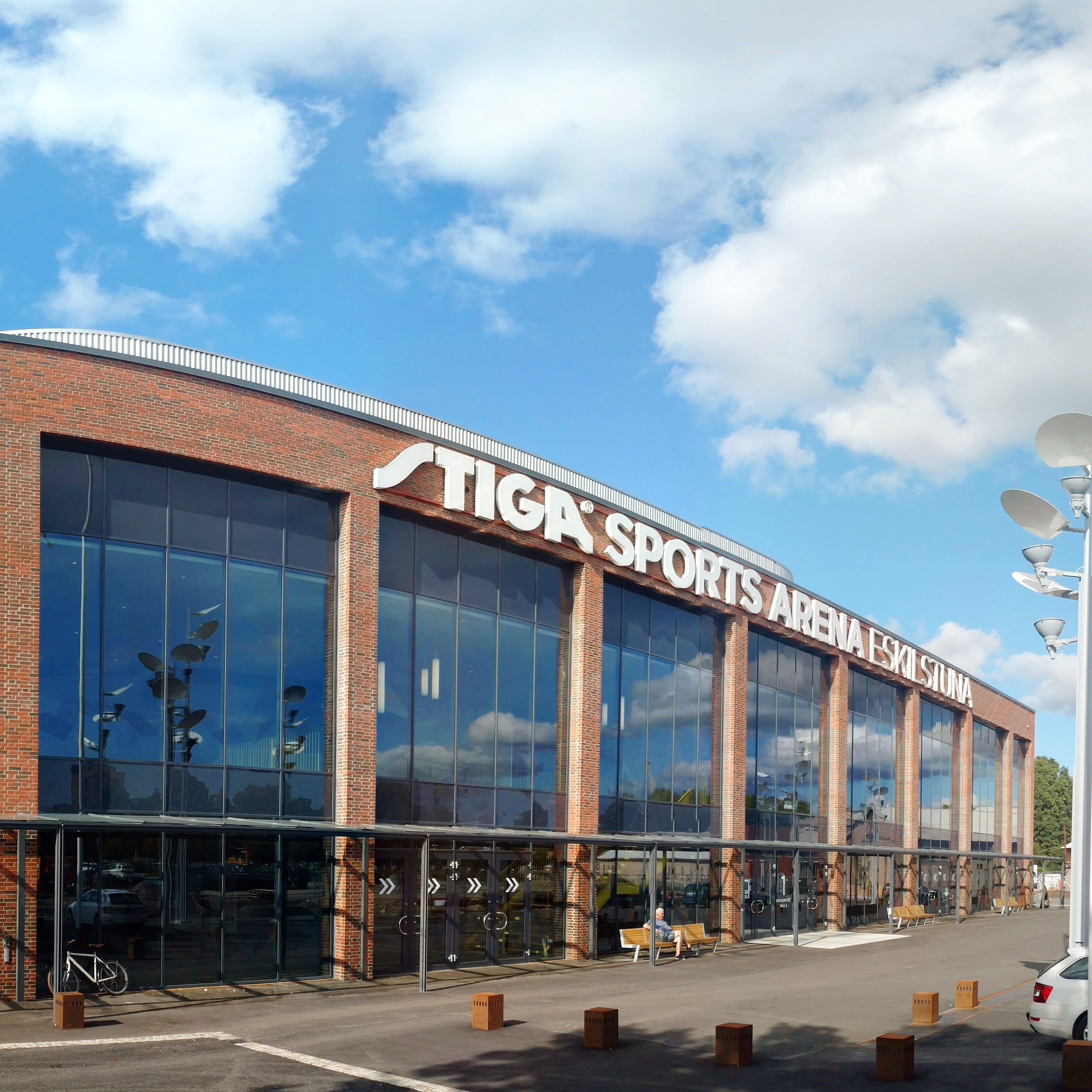 Entré bild på Stiga Sports Arena Eskilstuna